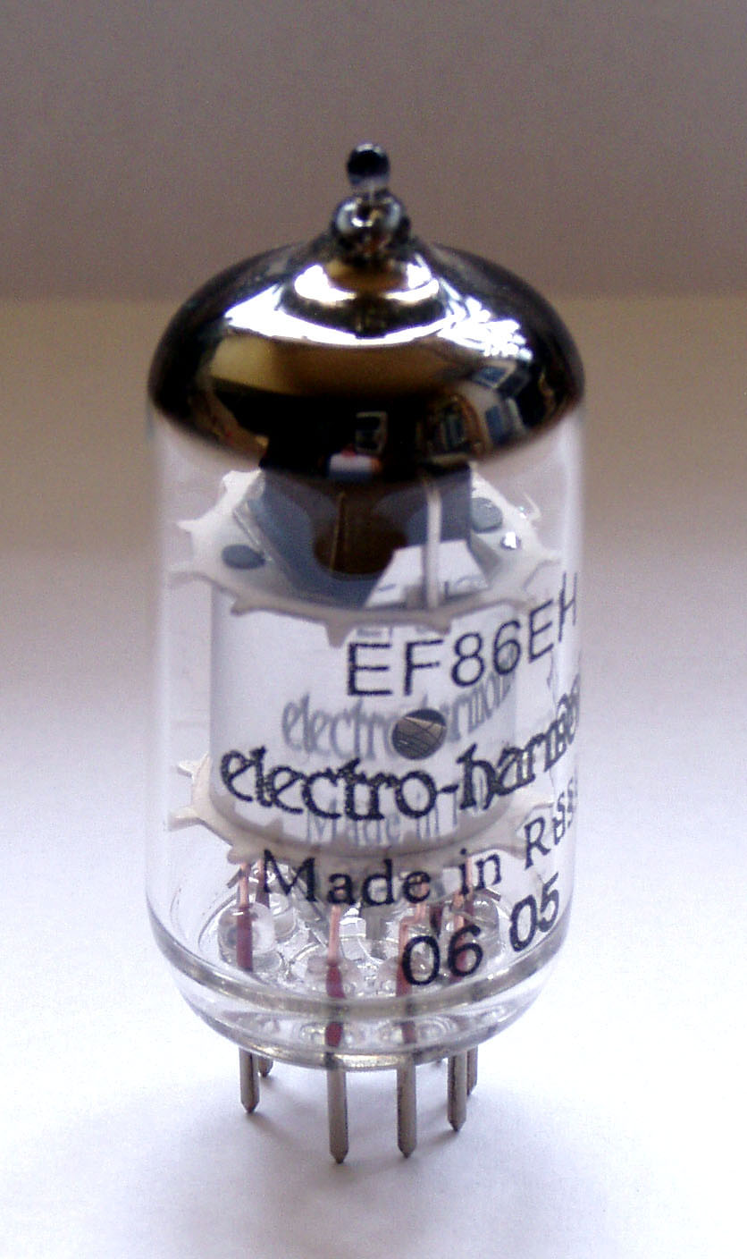 Ein aktueller russischer Nachbau der berühmten Vorstufenpentode EF86 von EH.